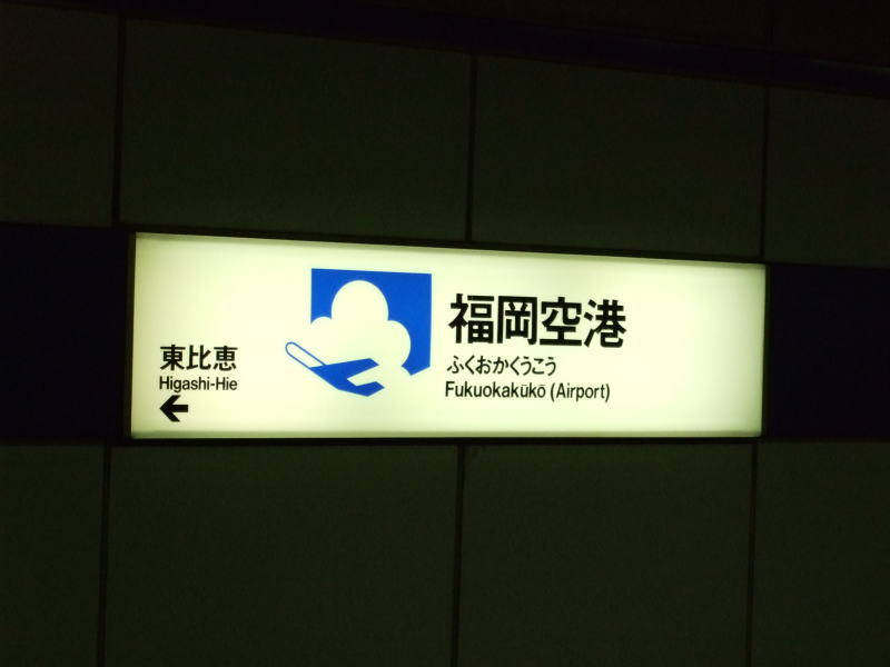 福岡県ja:福岡市にあるja:福岡市地下鉄空港線ja:福岡空港駅 ja:2007年ja:8月7日 地図帳が撮影 Category:福岡市交通局の画像 Category:駅名板画像